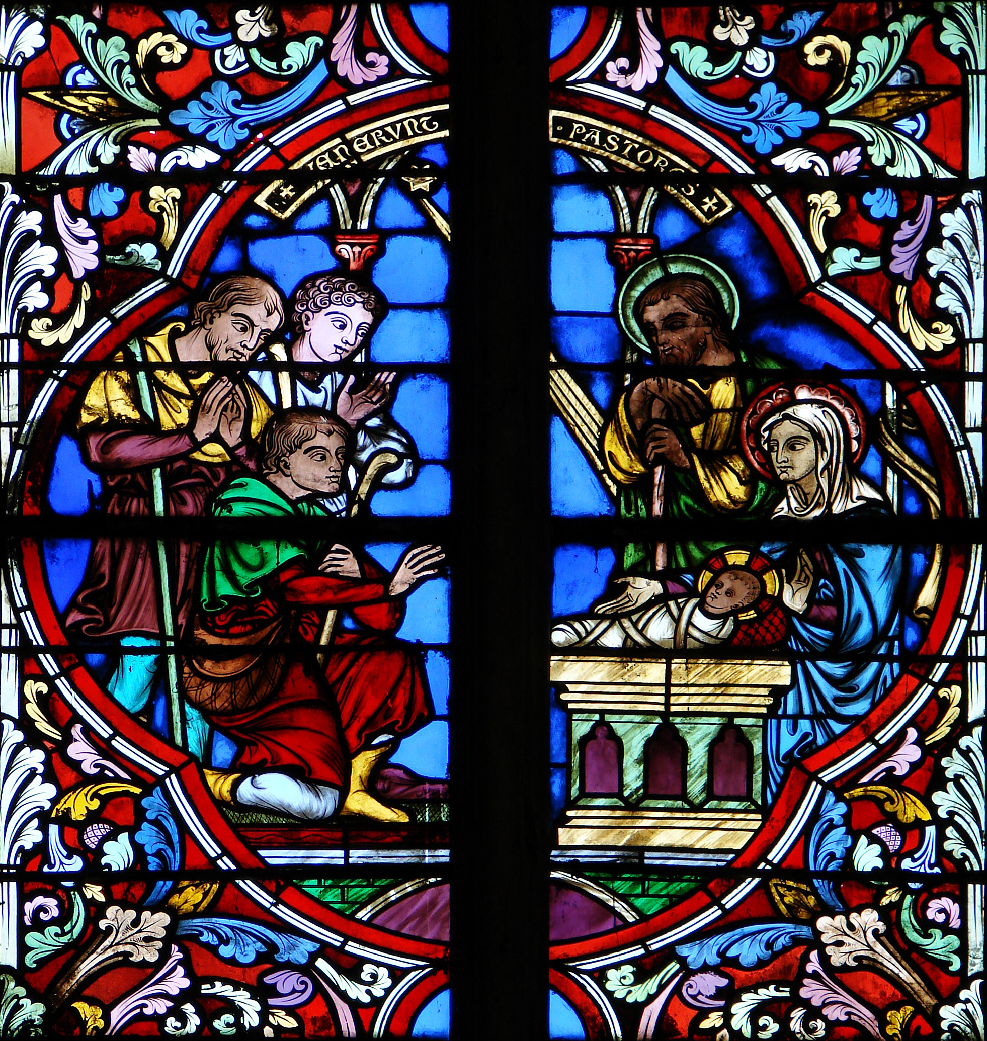 Détail d'une verrière néogothique de la cathédrale de Meaux, datée de 1875, et illustrant la vie de la Vierge: l'adoration des bergers.